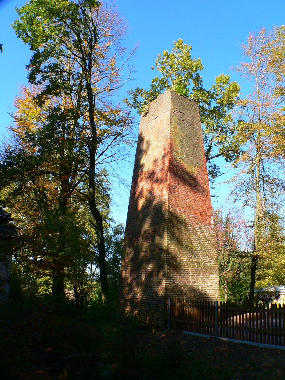 Rüttelturm des Braunkohlenabbaus auf dem Ahlberg im Reinhardswald